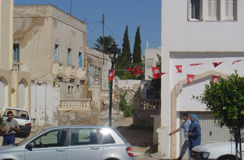 Palais Zaouche. Eté 2005 Photographie de l'auteur.